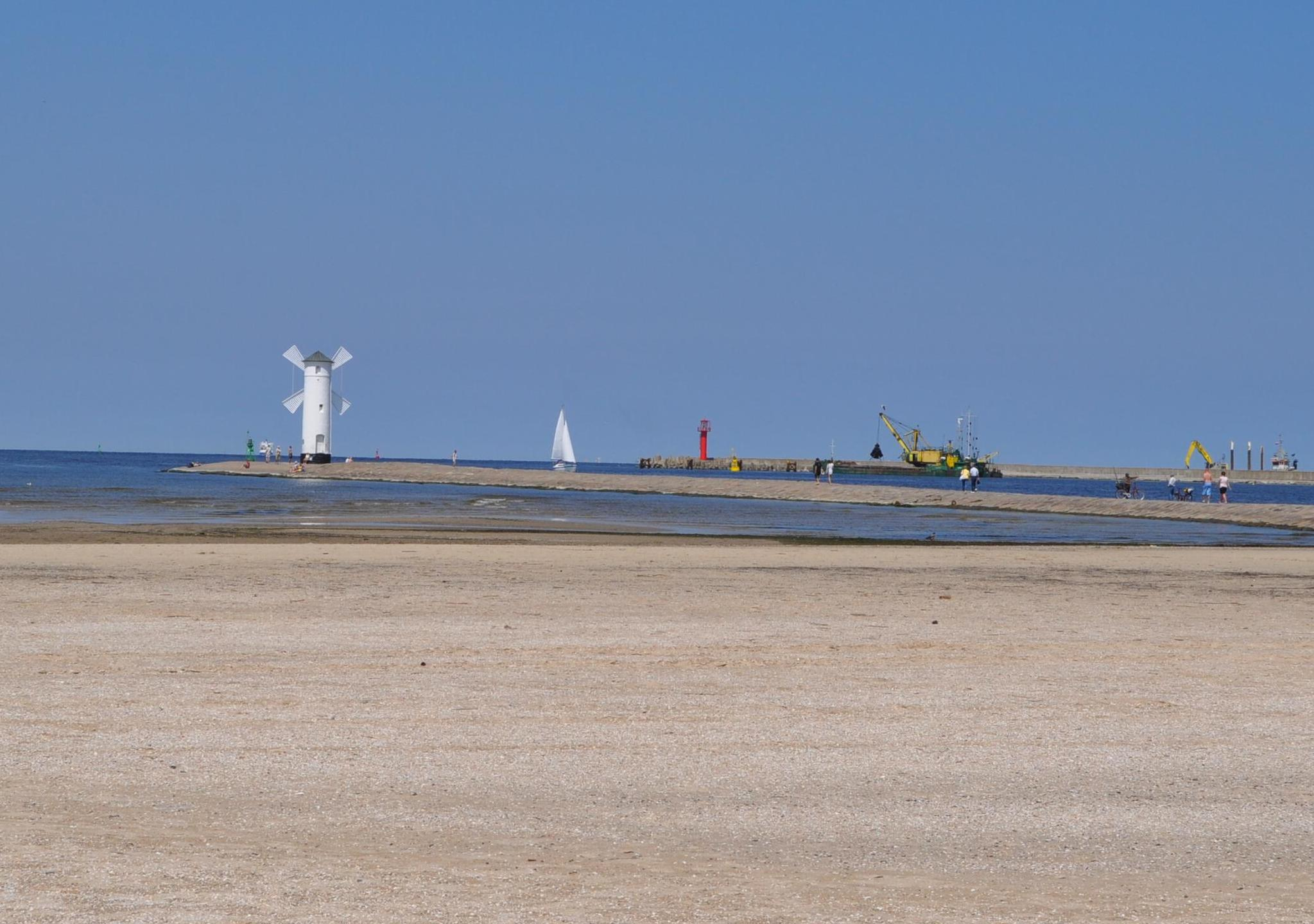 Mühlenbake auf der Westmole (Wahrzeichen Swinemündes) und dahinter Ostmole mit Leuchtbake